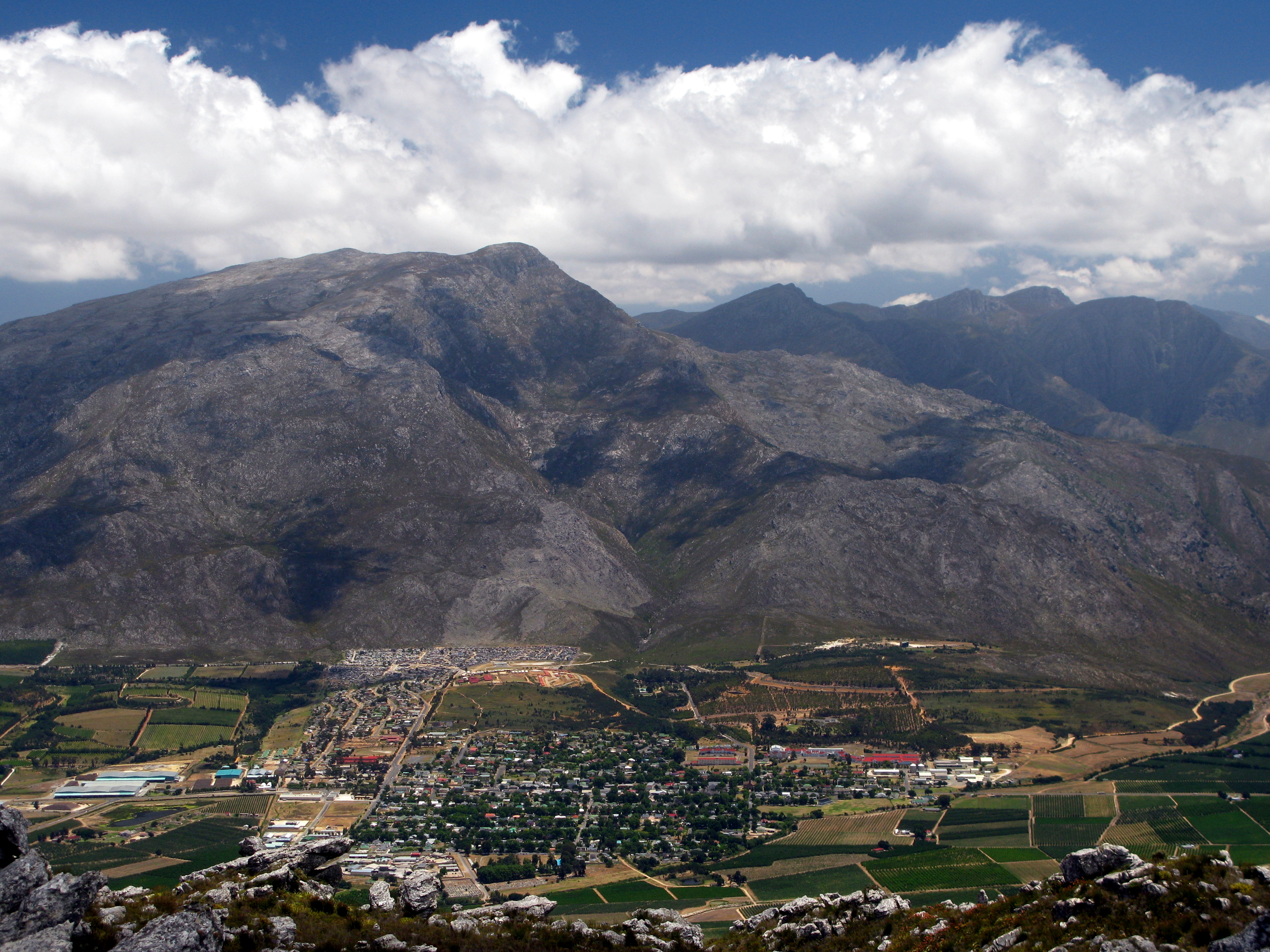 Foto geneem van Villiersdorp, aansig van die oostekant.